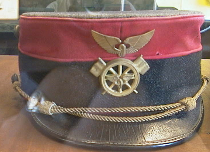 Junanlähettäjän virkalakki vuosimalli 1920